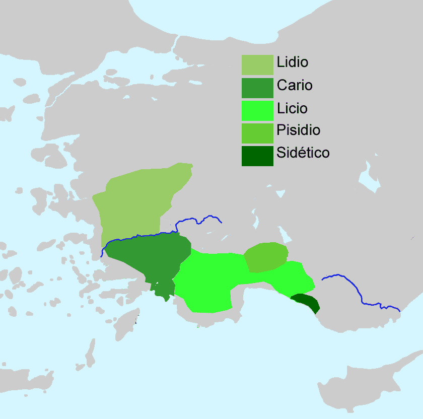 Lenguas neo-anatolias